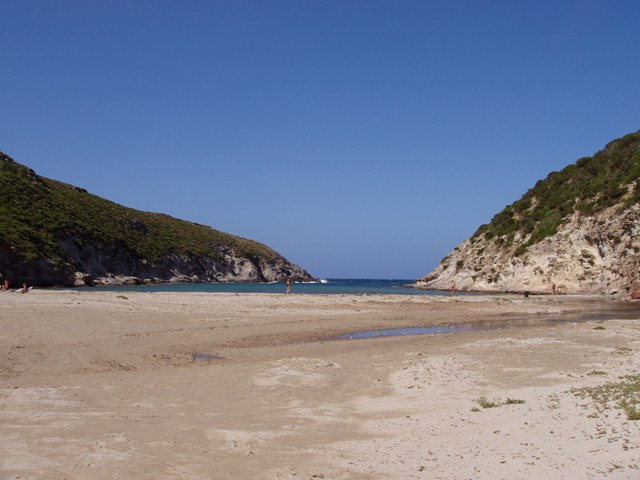 spiaggia di Cala Lunga nell'Isola di Sant'Antioco (provincia di Carbonia-Iglesias)